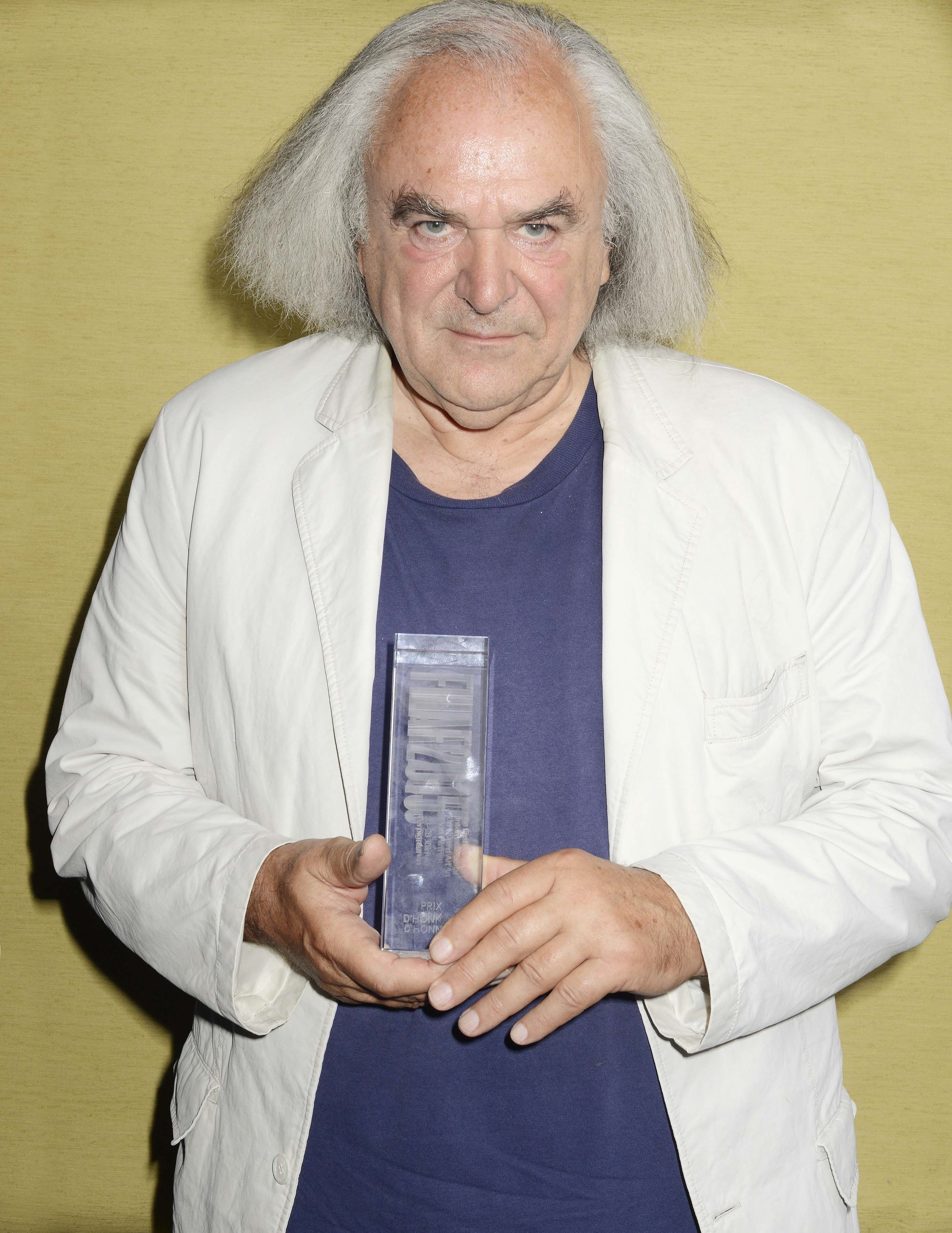 Alain Fleischer recevant un FILAF d'Honneur le 27 juin 2015 à Perpignan